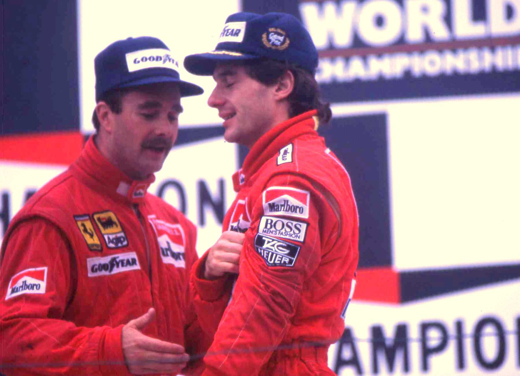 Nigel Mansell ( 3ieme) Ferrari et Ayrton Senna ( premier ) McLaren-Honda